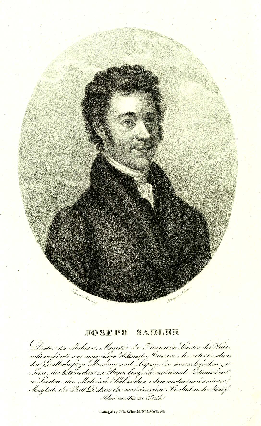 Sadler József (Joseph Sadler, Pozsony, 1791. május 6. – Pest, 1849. március 12.) orvosdoktor, botanikus, egyetemi tanár, a Magyar Nemzeti Múzeum természetrajzi osztályának őre.